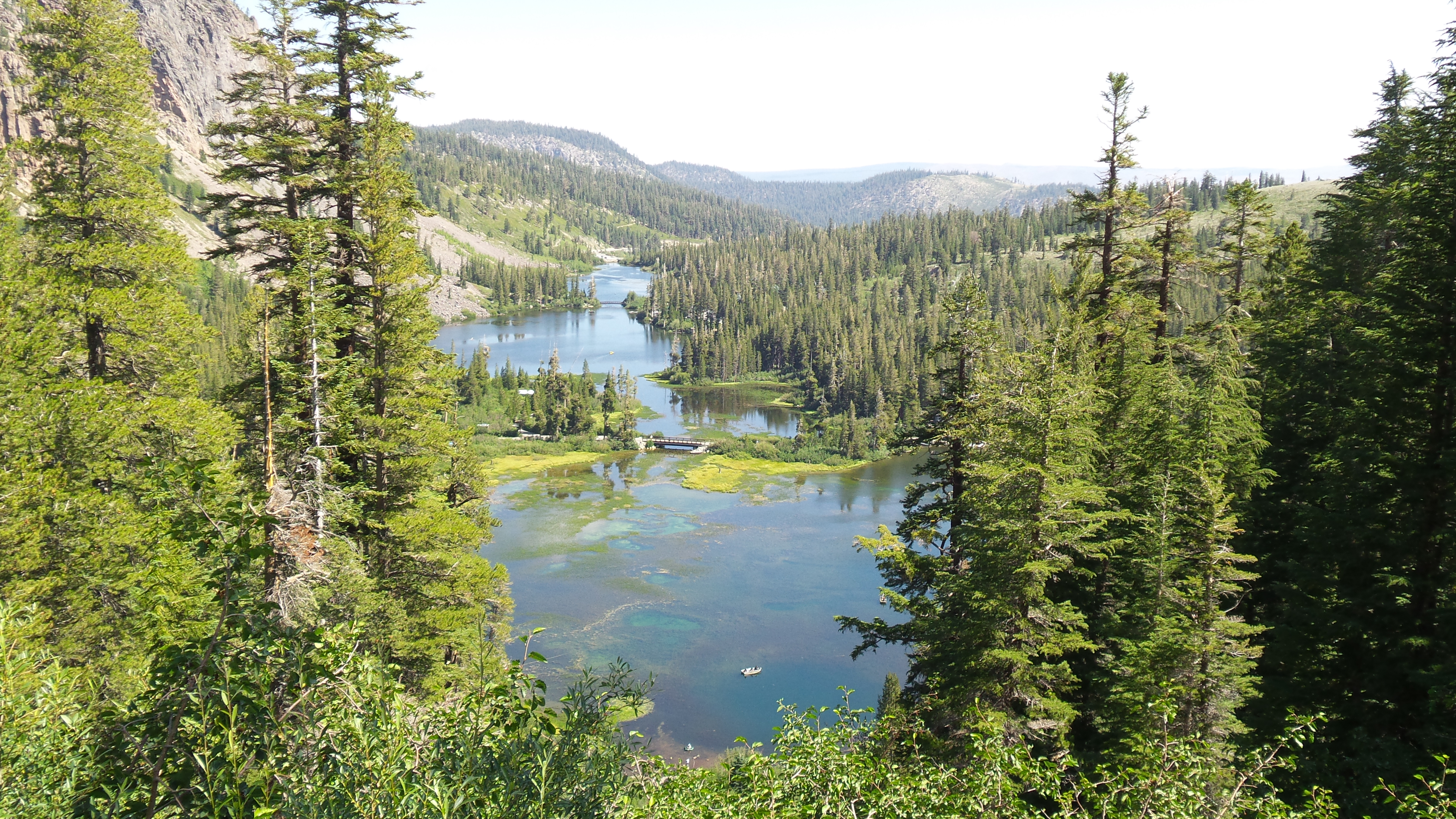 Mammoth Lakes, Калифорния, США